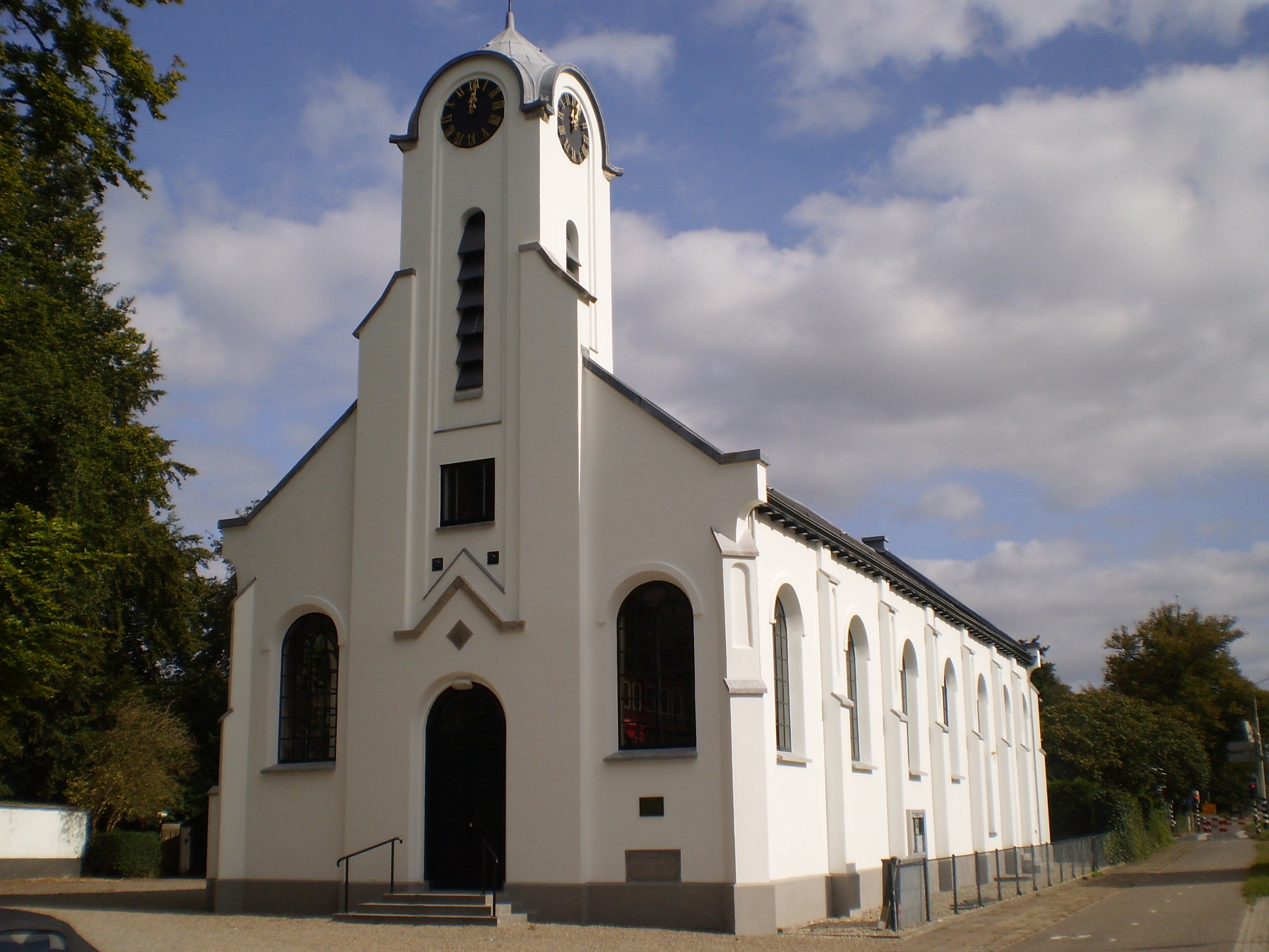 NH kerk 'Het witte kerkje', Huis ter Heide